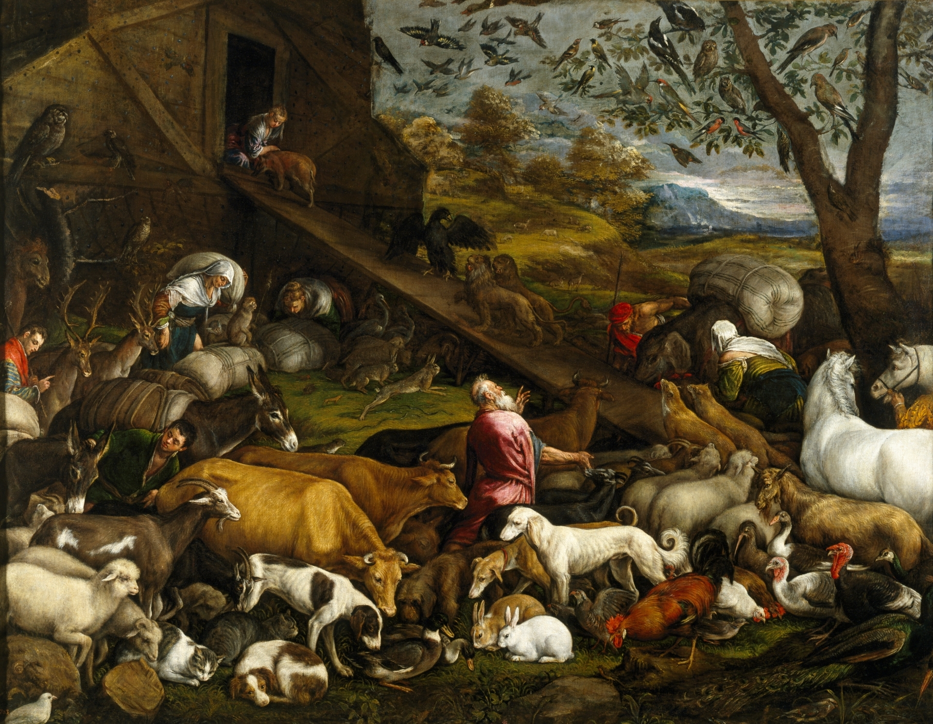 La obra, inspirada en un pasaje del Antiguo Testamento, muestra a los animales entrando en el Arca de Noé.